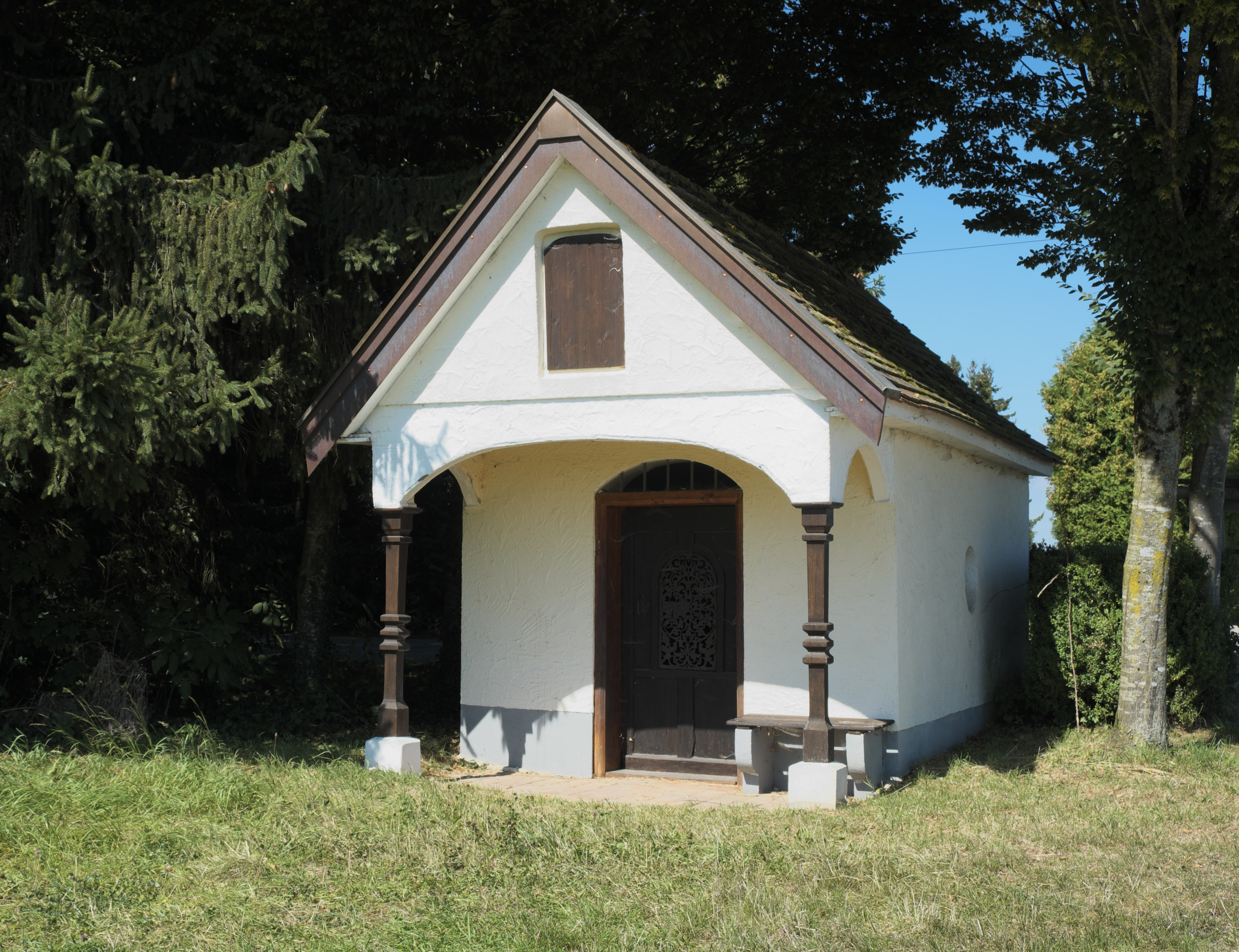 Kapelle St. Maria in Wagelsried (Alling) im Landkreis Fürstenfeldbruck (Bayern/Deutschland)